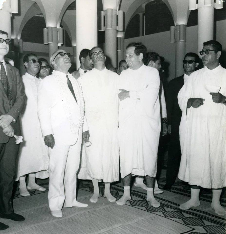 Habib Bourguiba inspectant une mosquée en Tunisie accompagné par Mokhtar Latiri (2ème à partir de la droite en jebba blanche). Mr Hédi Baccouche est à gauche en coustume gris foncé.